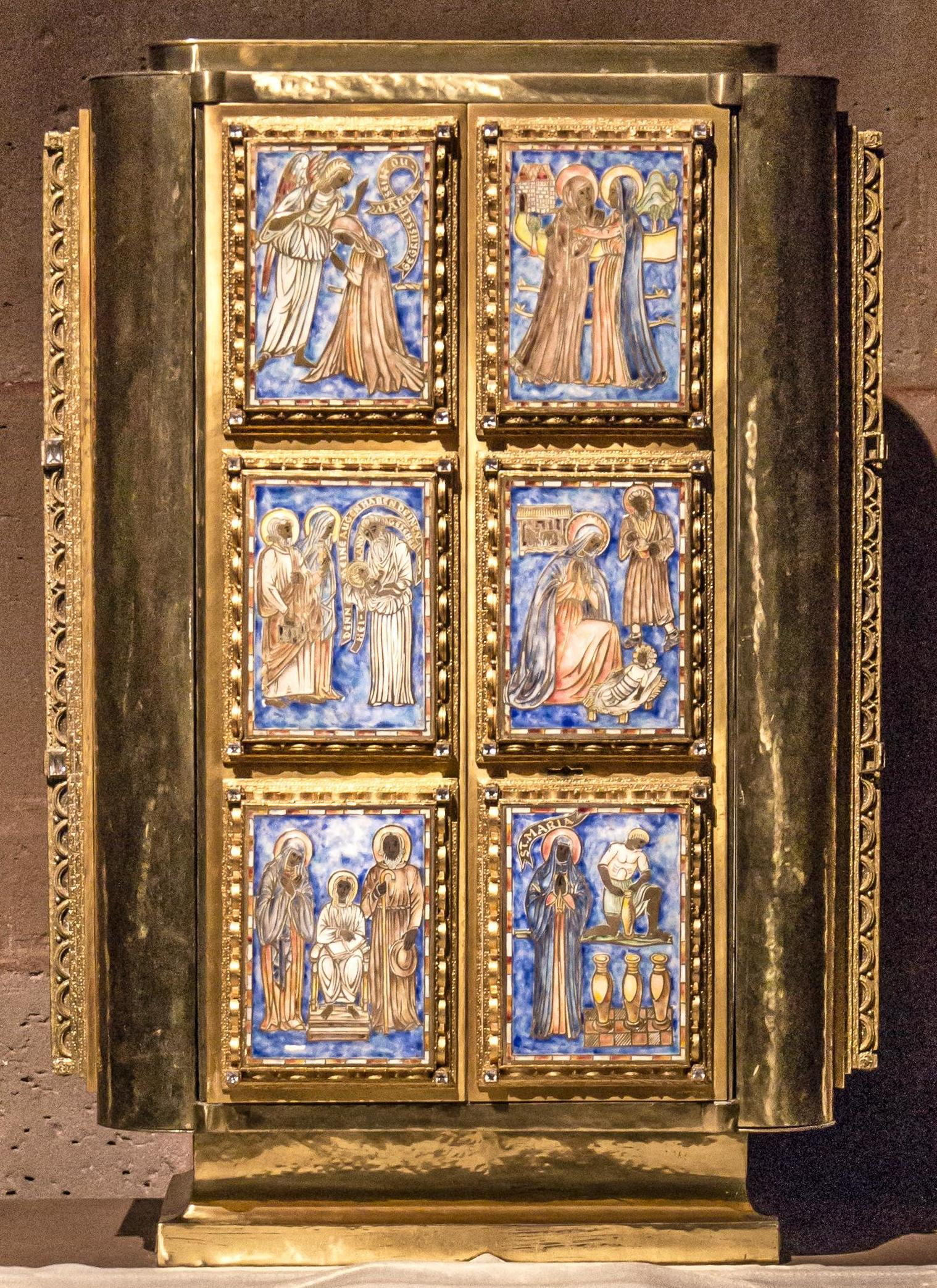 Tabernakel von Fritz Möhler, Schwäbisch-Gmünd, 1938/40 in der Alexander (Annen) Kapelle im Freiburger Münster